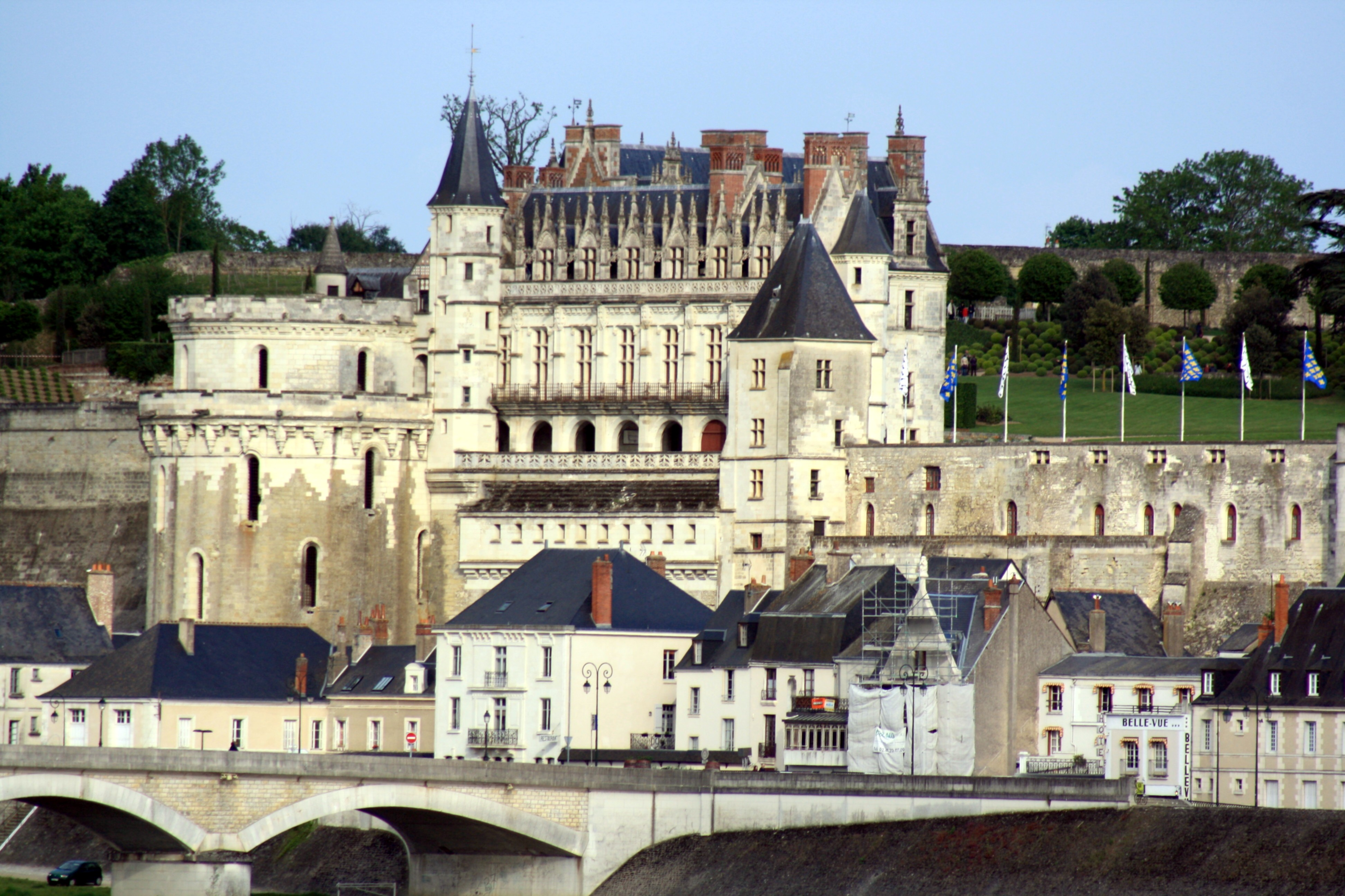 Un des plus beaux château de la Loire sur la Loire .